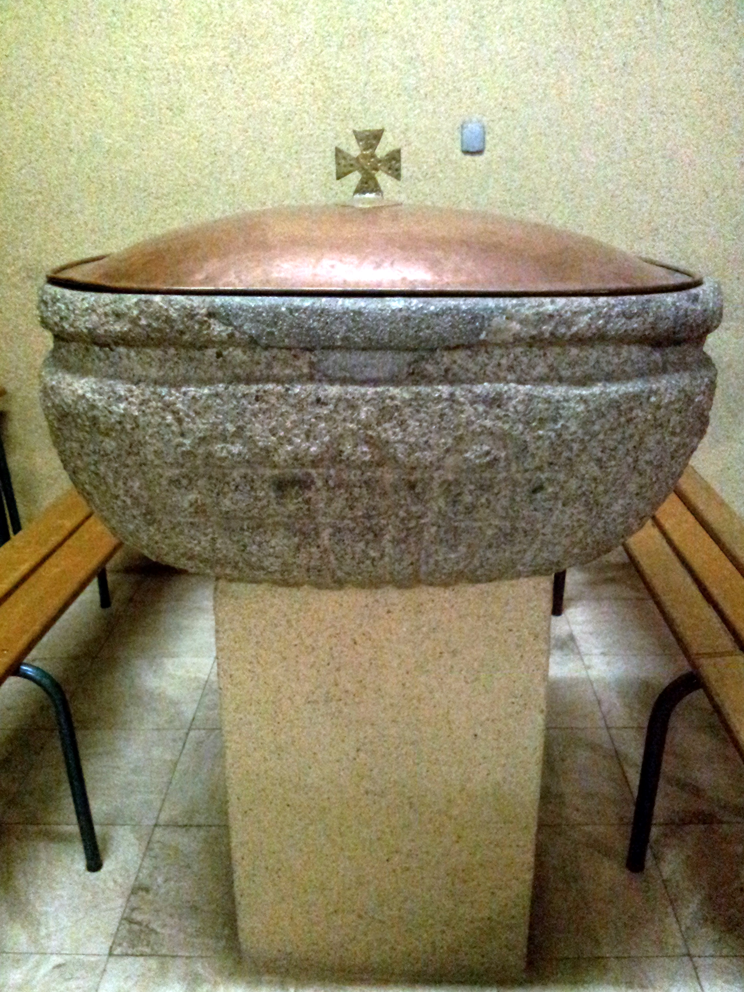 Baptistère de l'église de L'Huisserie